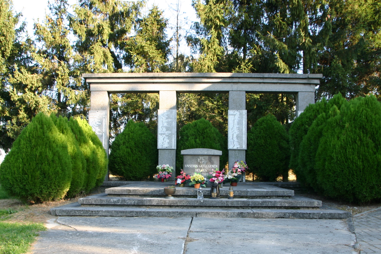 Pomnik poległych w wojnach światowych w Łężcach – wieś w Polsce położona w województwie opolskim, w powiecie kędzierzyńsko-kozielskim, w gminie Reńska Wieś.